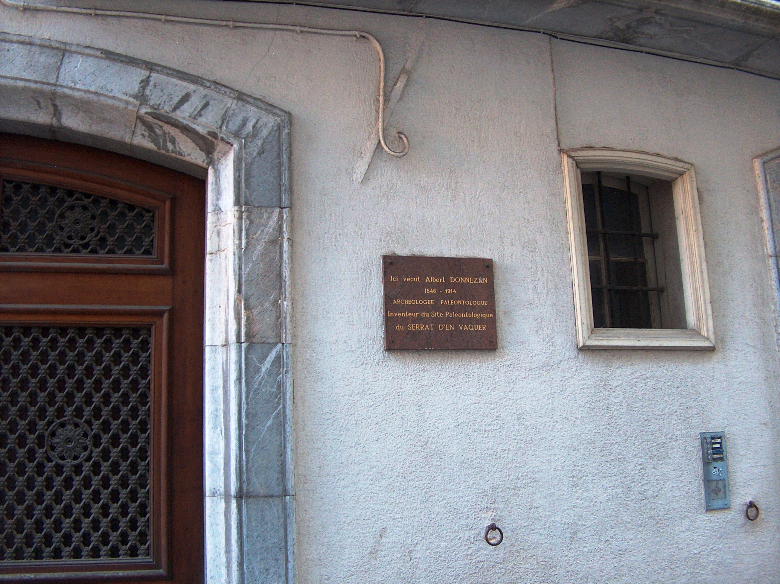 Plaque apposée au 5 rue Fontaine Froide. Albert Donnezan médecin et palétontologue découvrit le site du Serrat d'en Vaquer.